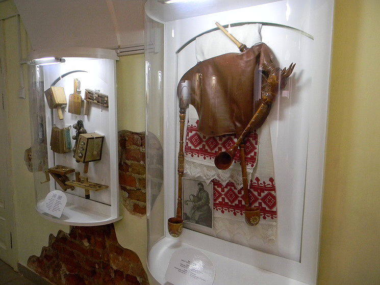 Музычны музей. Дуда